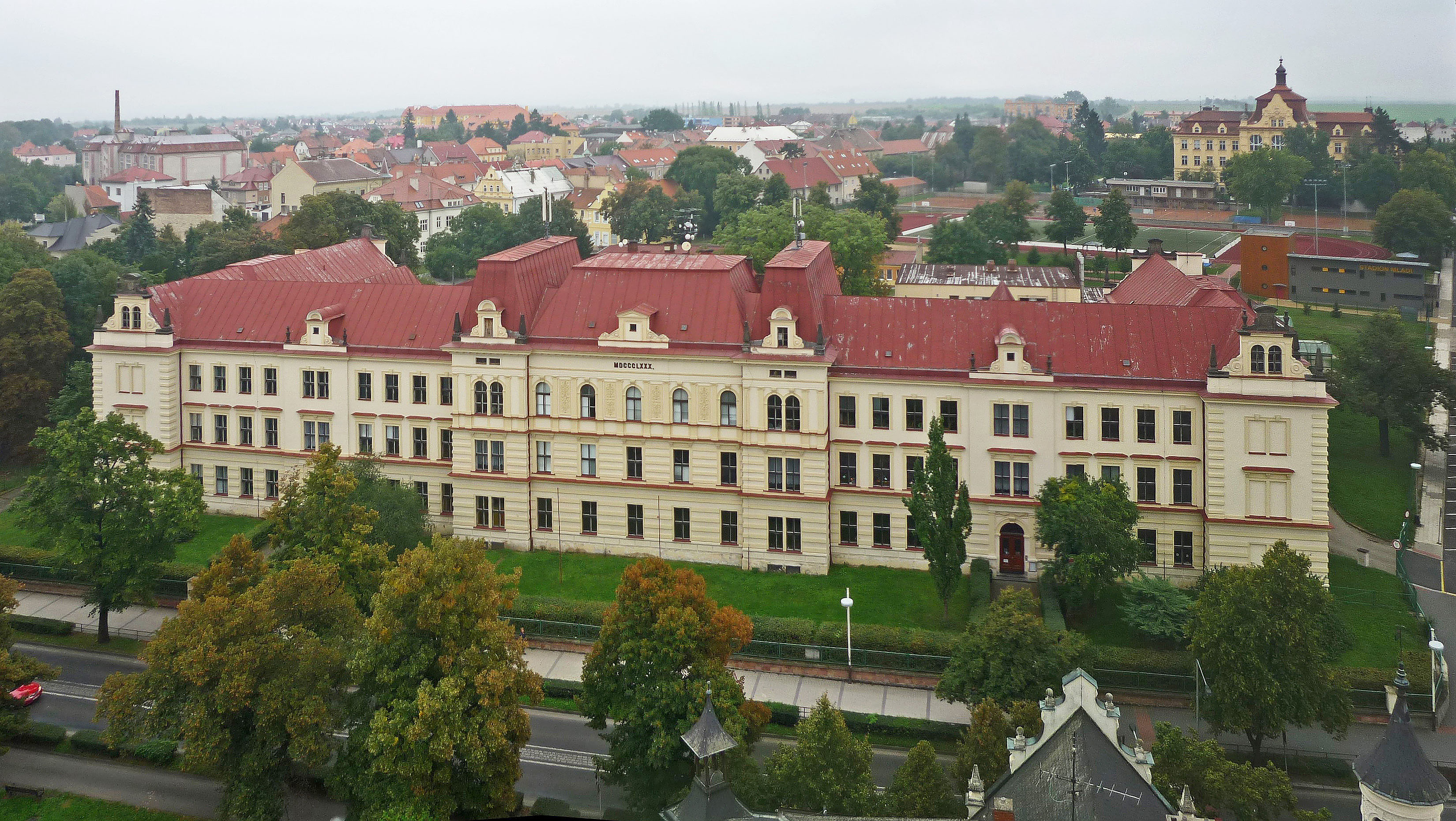 Saaz/Žatec, Blick vom Hopfenturm auf Bürgerschule und Gymnasium